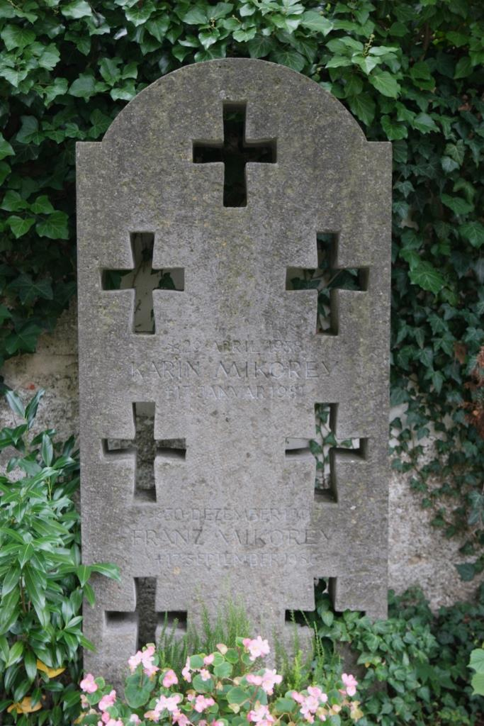 Grab des Bildhauers Franz Mikorey, 1907-1986, auf dem Alten Friedhof München-Solln, Friedhofweg 1